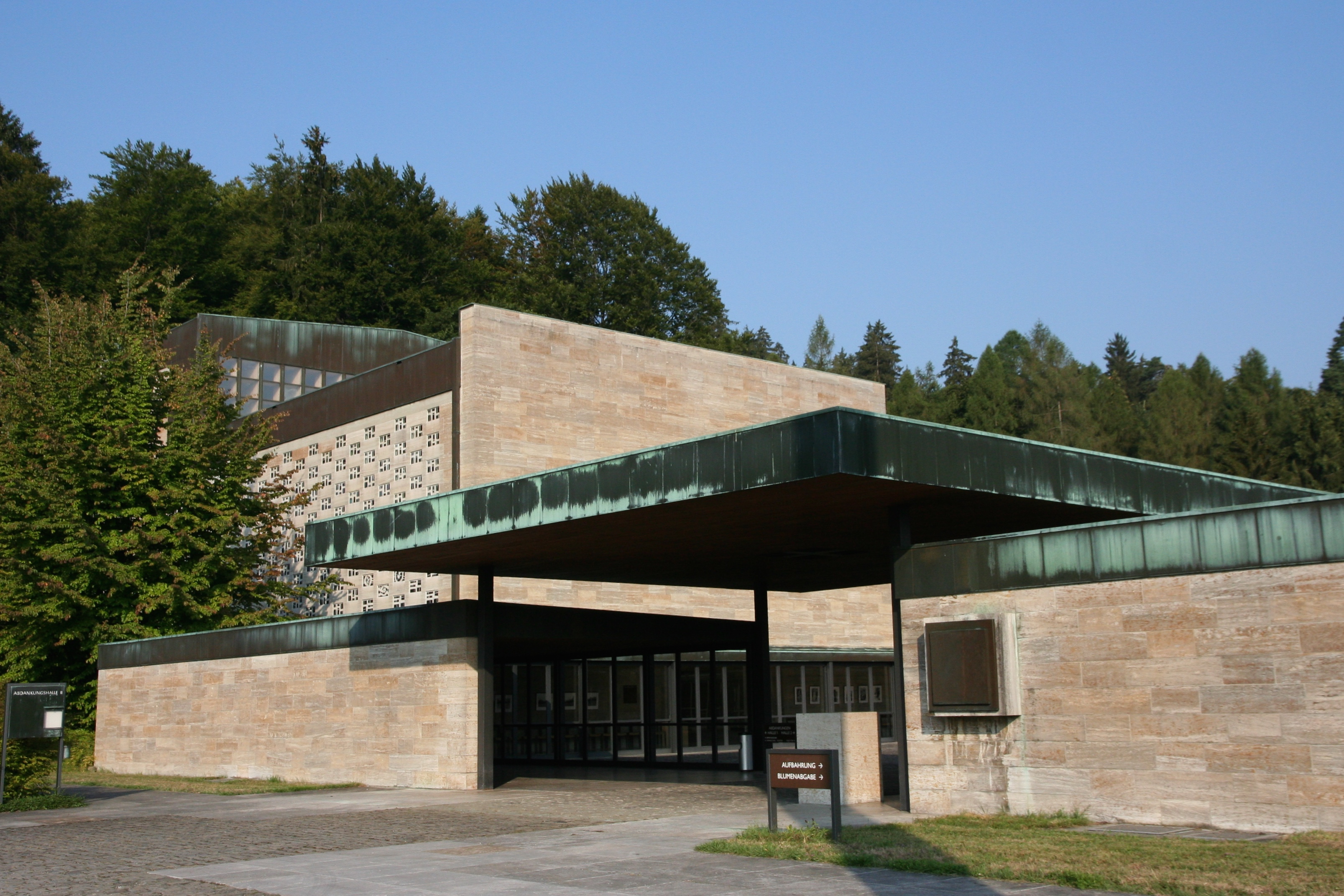 Krematorium Nordheim Zürich